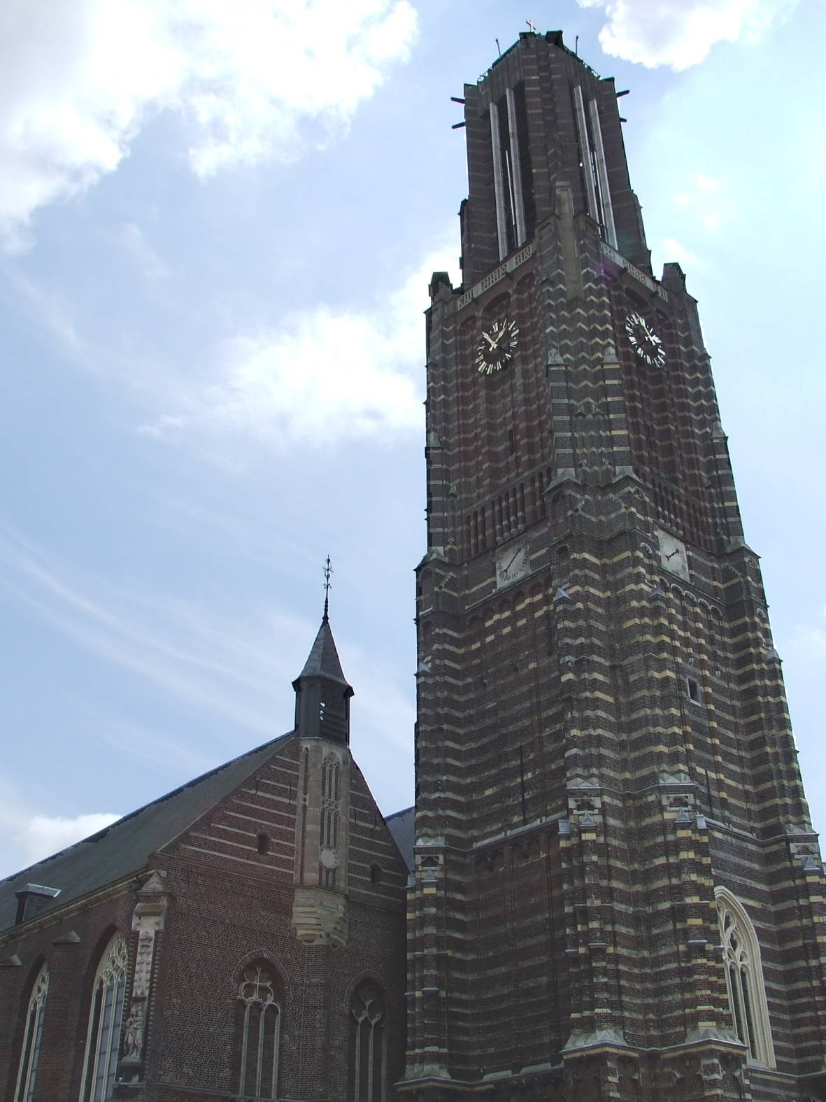 Foto Sint-Martinuskerk Weert